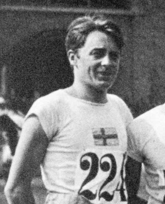 Gustaf Carlén, Stockholm Olympics